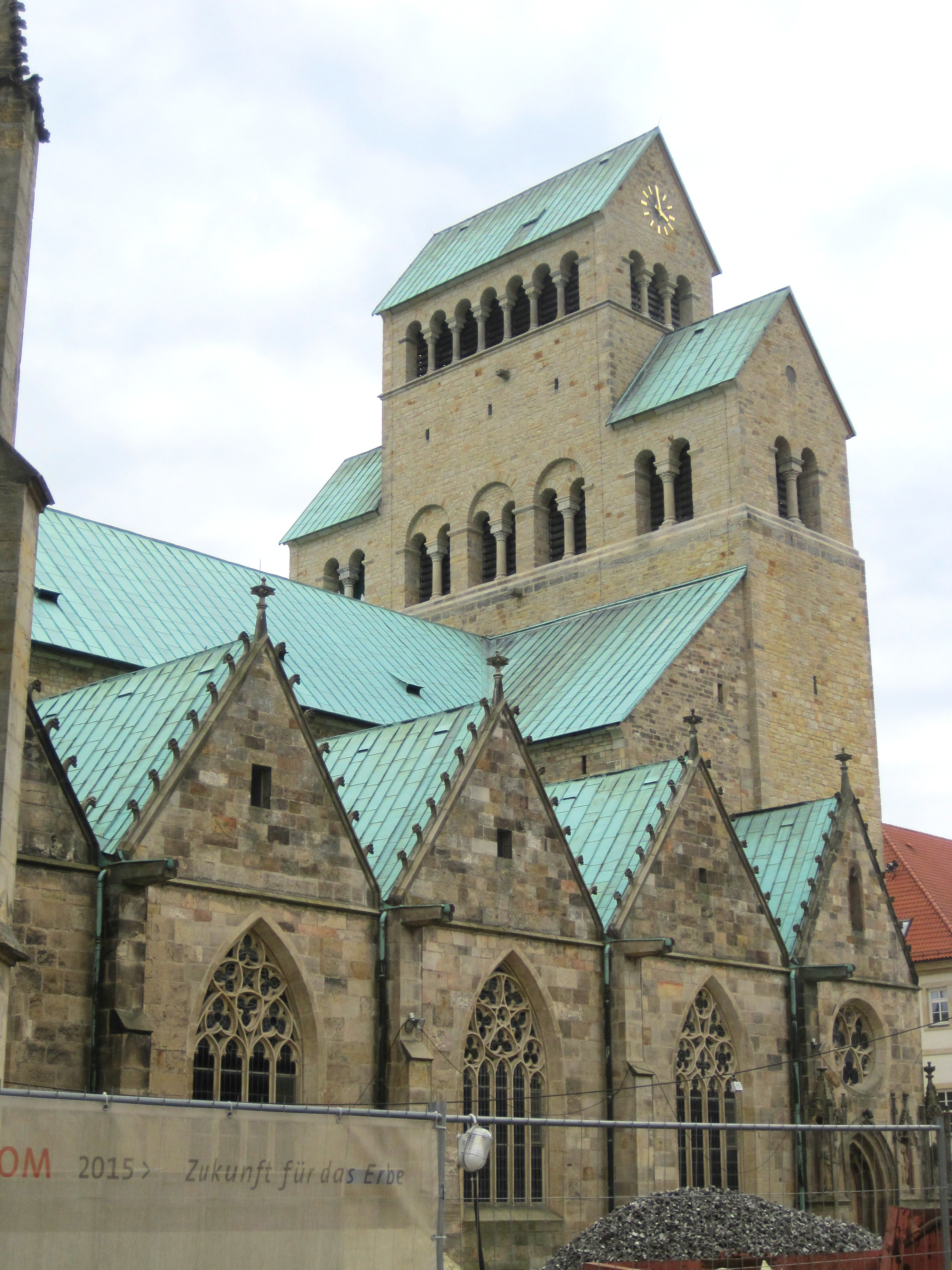 Westwerk und Seitenkapellen des Hildesheimer Doms